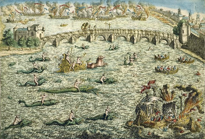 Spectacle nautique donné lors de l’entrée royale d’Henri II de France et de Catherine de' Medici à Rouen, le premier octobre 1550